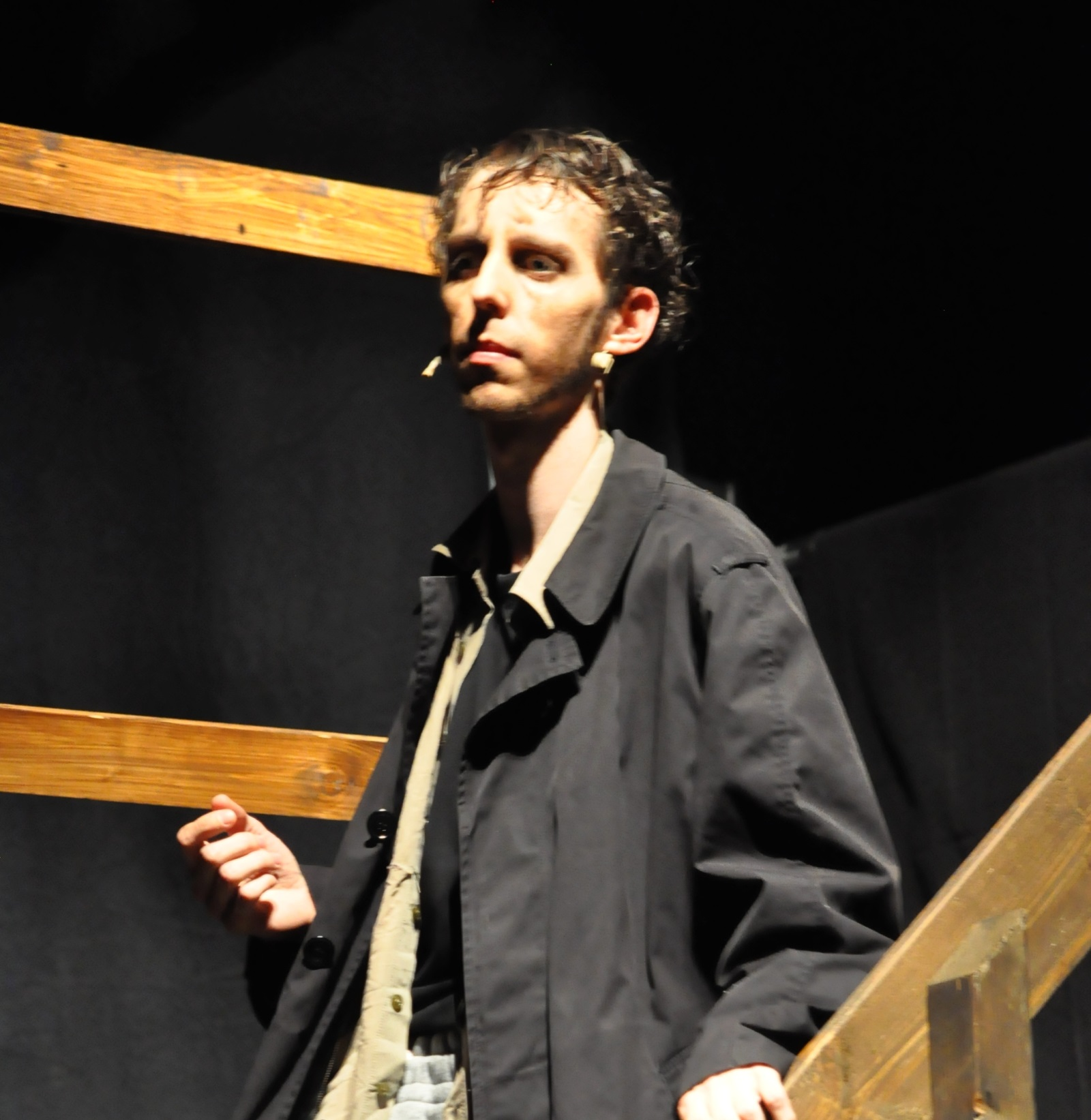 Thomas Bernardy als Erzähler in einer Musicalproduktion, Dezember 2014